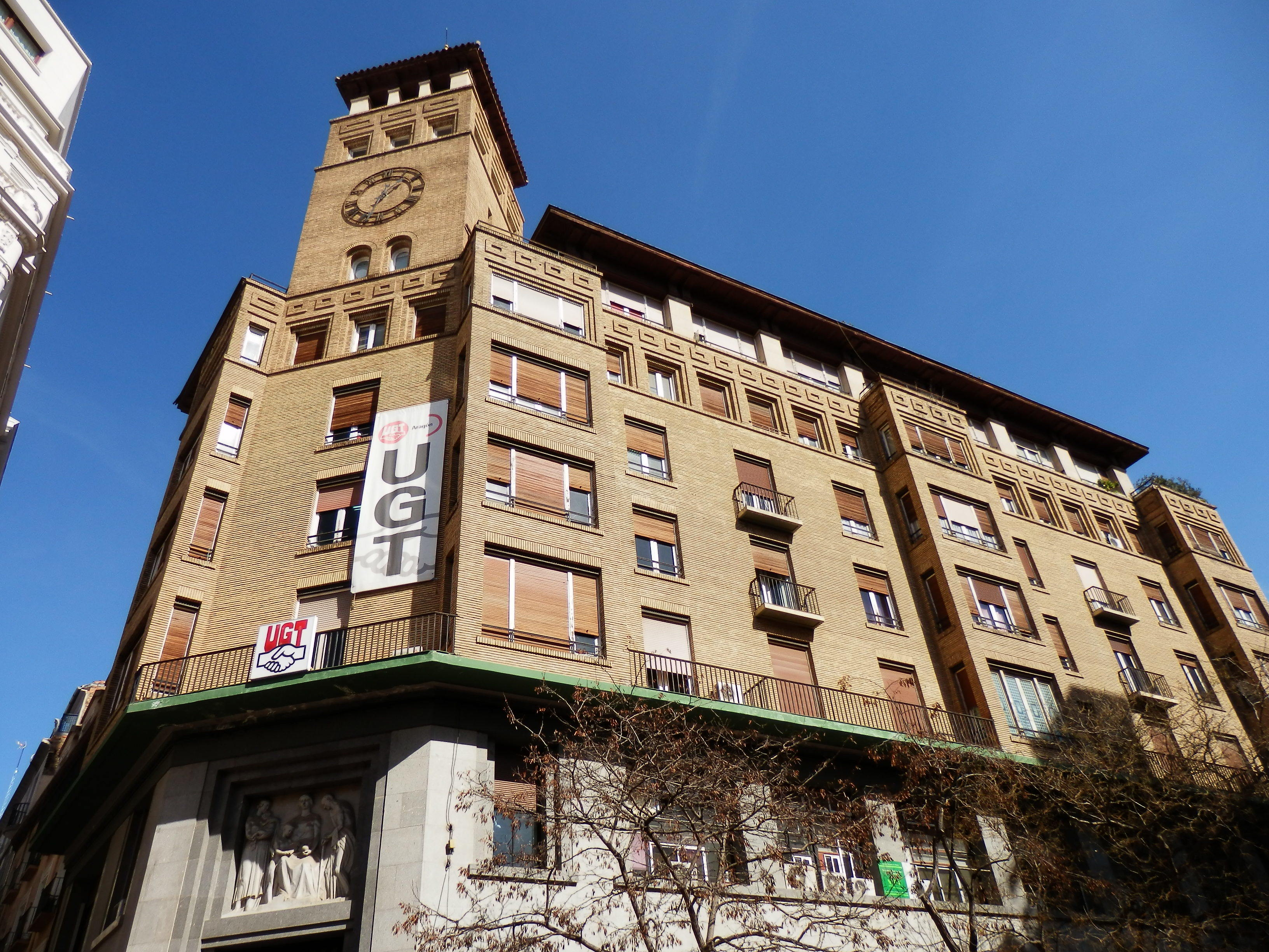 Casa en la calle Joaquín Costa, 1, Zaragoza. Alegoría del paso de la vida en la entrada del edificio realizada por Félix Burriel.